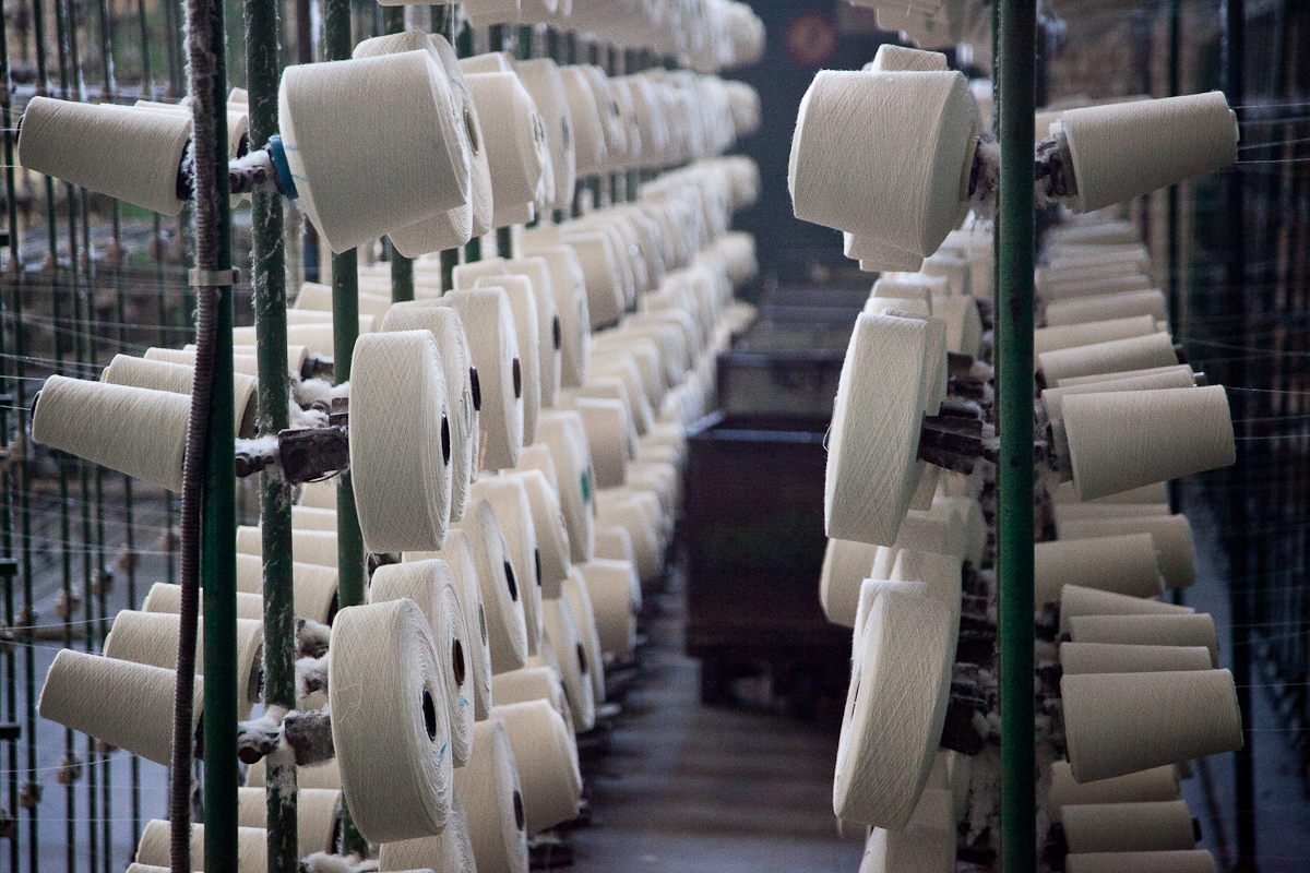 Текстильная промышленность в Камышине